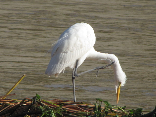 Լուսակնարը արվել է 2010 թվականի Դեկմոբերի 25-ին Լոս Անջելես գետի ափին։